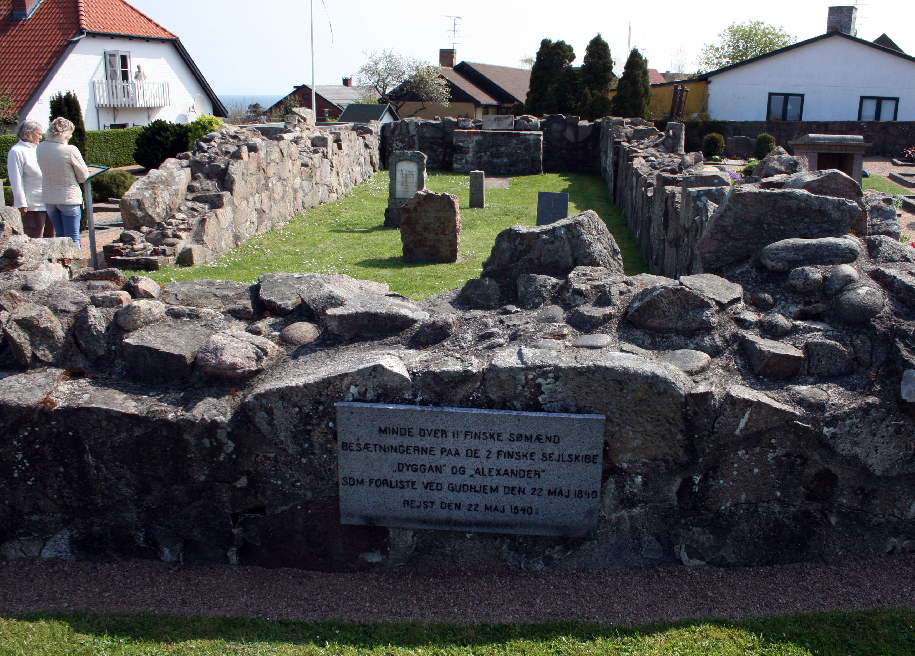 Skt. Anna kapel med mindetavle. Tæt på Gudhjem Kirke